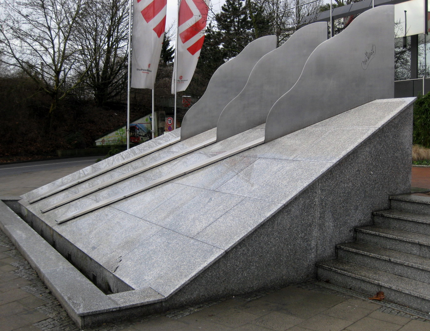 Stefan Schwerdtfeger (* 1928): Wolkenbrunnen (1978-1980), Edelstahl, Granit, Beton, in Osnabrück (Niedersachsen), vor der Hauptverwaltung der Stadtwerke Osnabrück, Buersche Straße